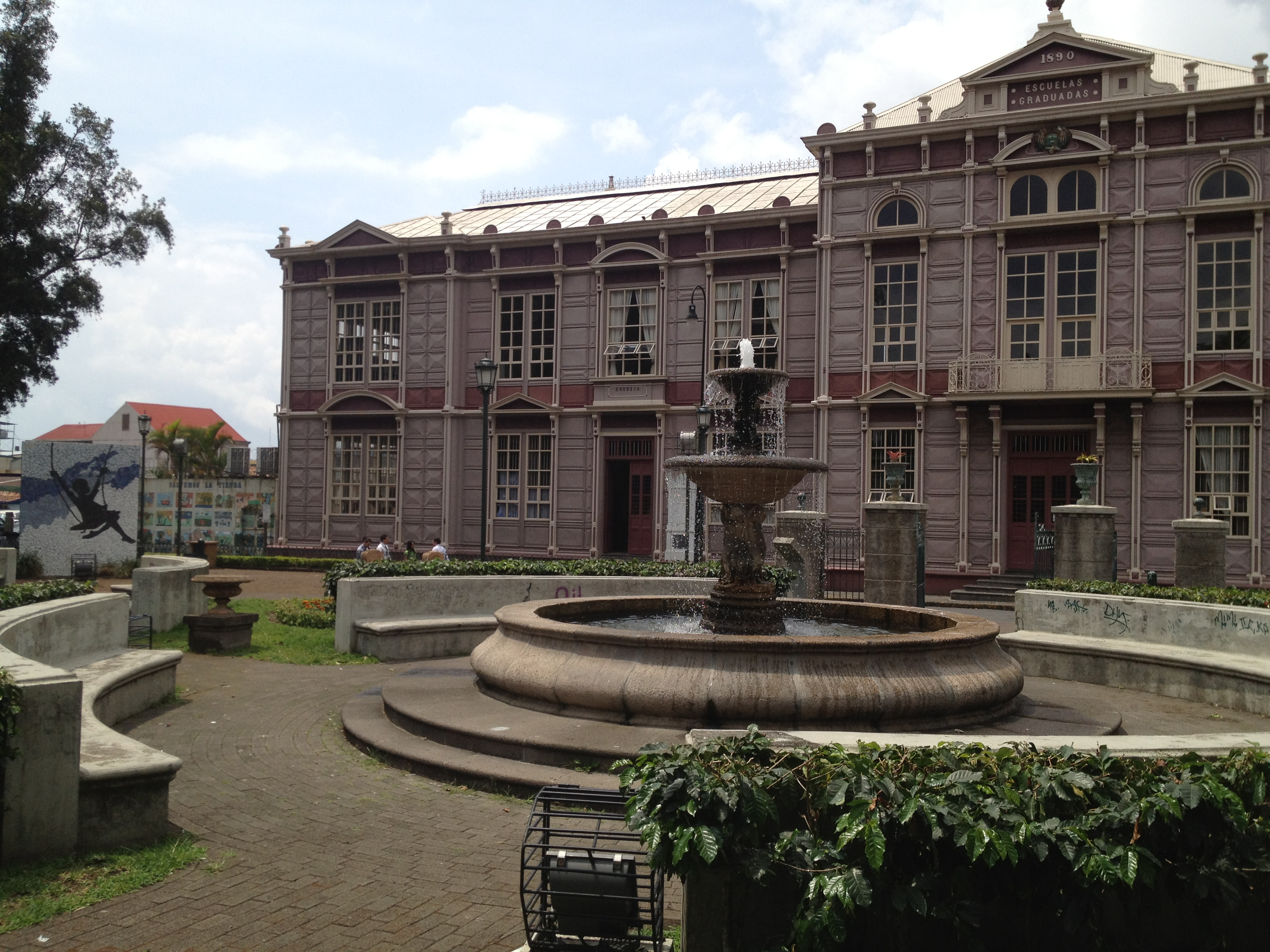 Escuela Metálica y Jardín de Paz, en San José, Costa Rica.